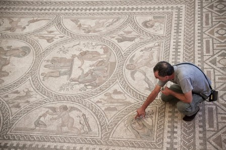 Marcelo Castro commente un détail de la mosaïque.